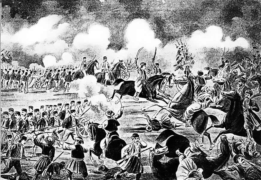 Српски (ћирилица): Славна победа Срба под Карађорђем над Турцима на Мишару,на св. Илију 1806. год.